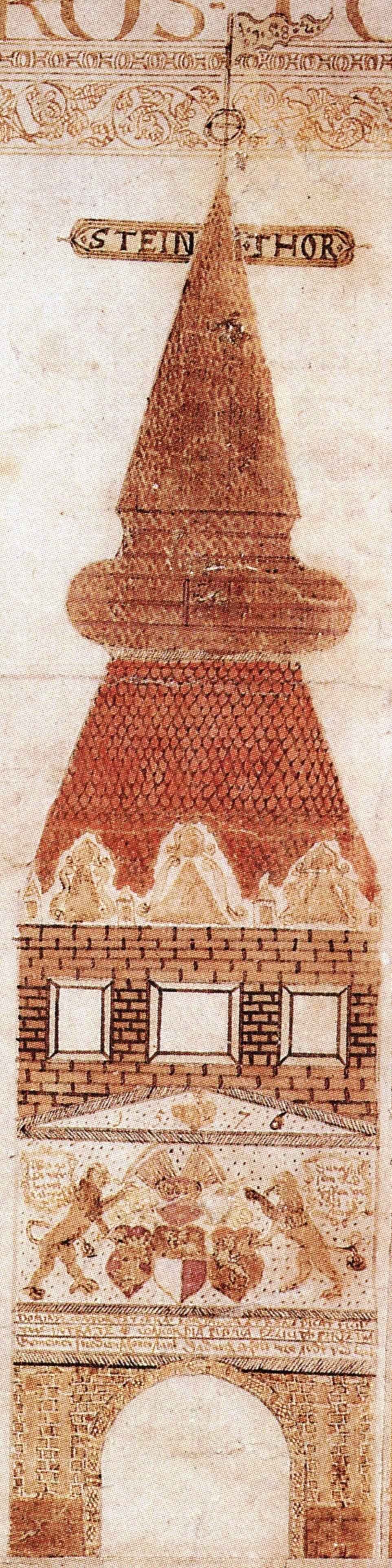 Steintor Rostock in der Darstellung der Vicke Schorler Rolle